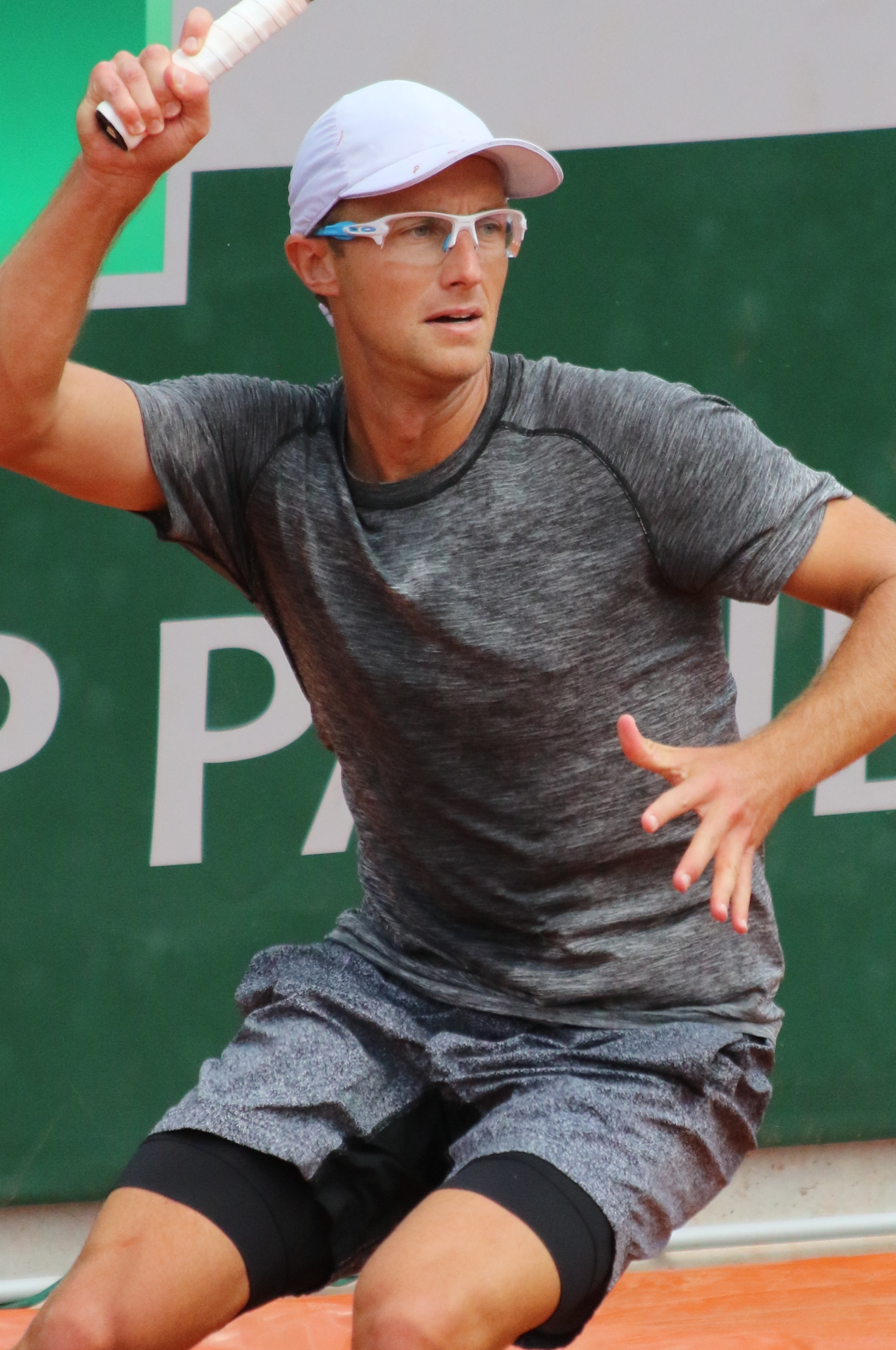 Polansky RG18 (13)